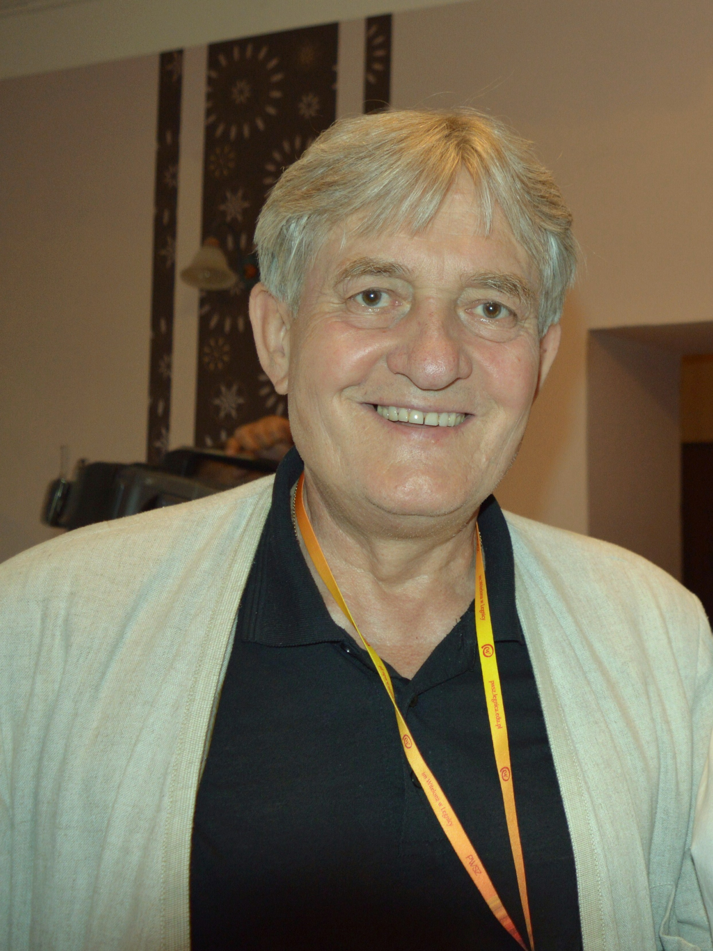 Marek Frąckowiak, aktor.